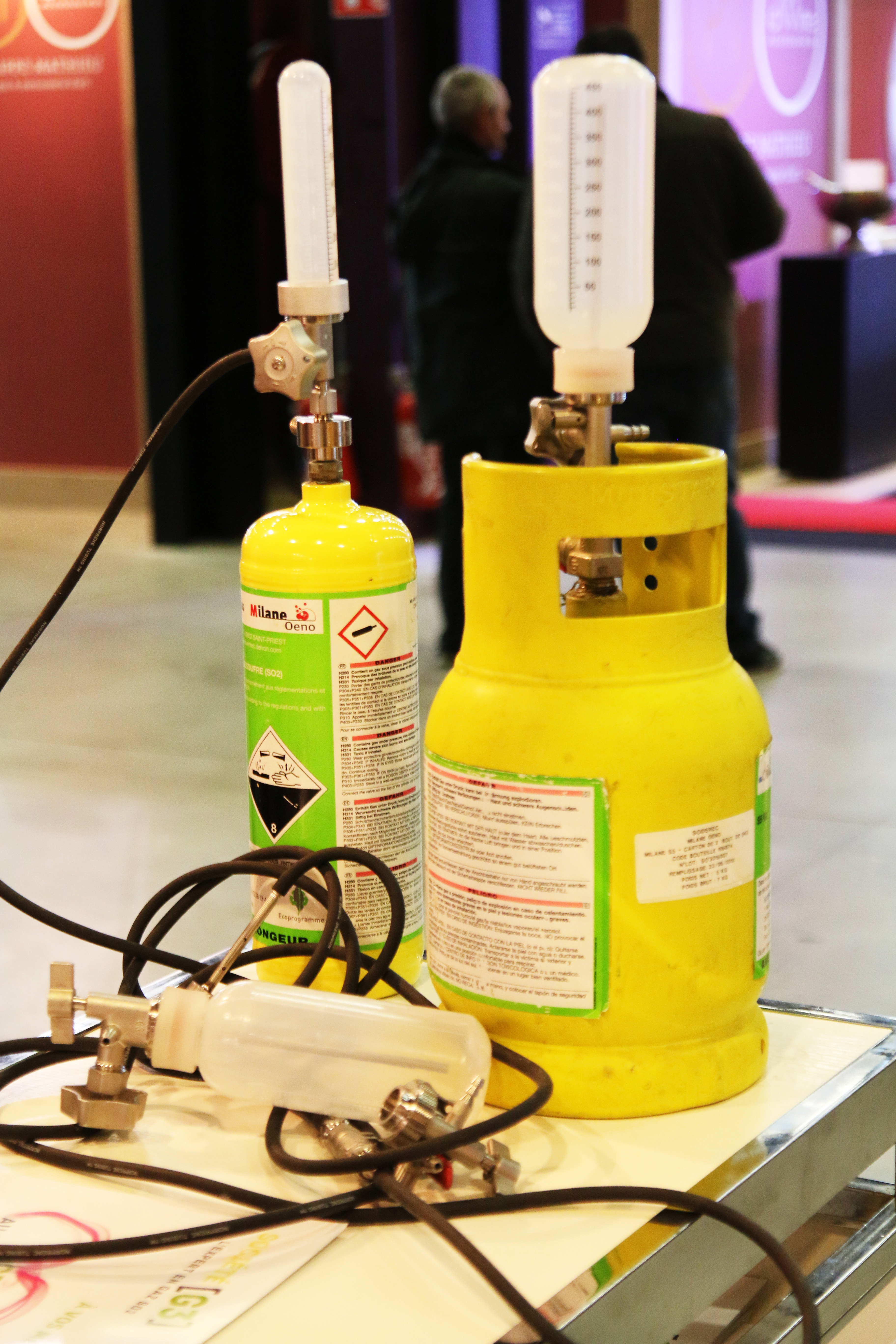 Sulfidoseur permettant de libérer du SO2 sous pression